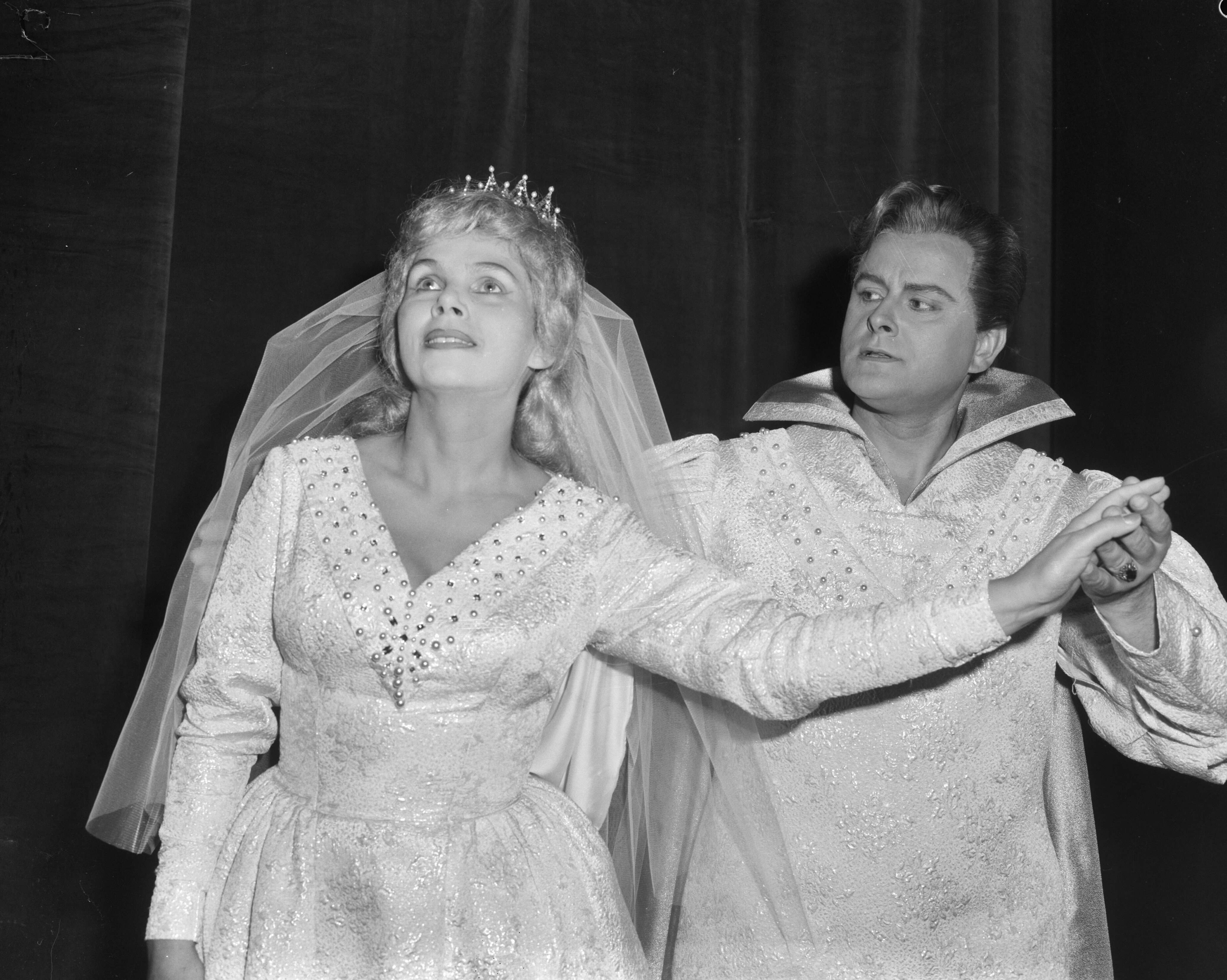 Collectie / Archief : Fotocollectie Anefo Reportage / Serie : [ onbekend ] Beschrijving : "Holland Festival" 1963 . De Nederlandse opera Rusalka opgevoerd in Stadsschouwburg. Prins Yvo Zidek en de vorstin Ivana Mixova (wrsch.: Jadwiga Wysoczanska als prinses Rusalka) Datum : 21 juni 1963 Trefwoorden : OPERA, STADSSCHOUWBURGEN Persoonsnaam : Rusalka Fotograaf : Bilsen, Joop van / Anefo Auteursrechthebbende : Nationaal Archief Materiaalsoort : Negatief (zwart/wit) Nummer archiefinventaris : bekijk toegang 2.24.01.04 Bestanddeelnummer : 915-2828